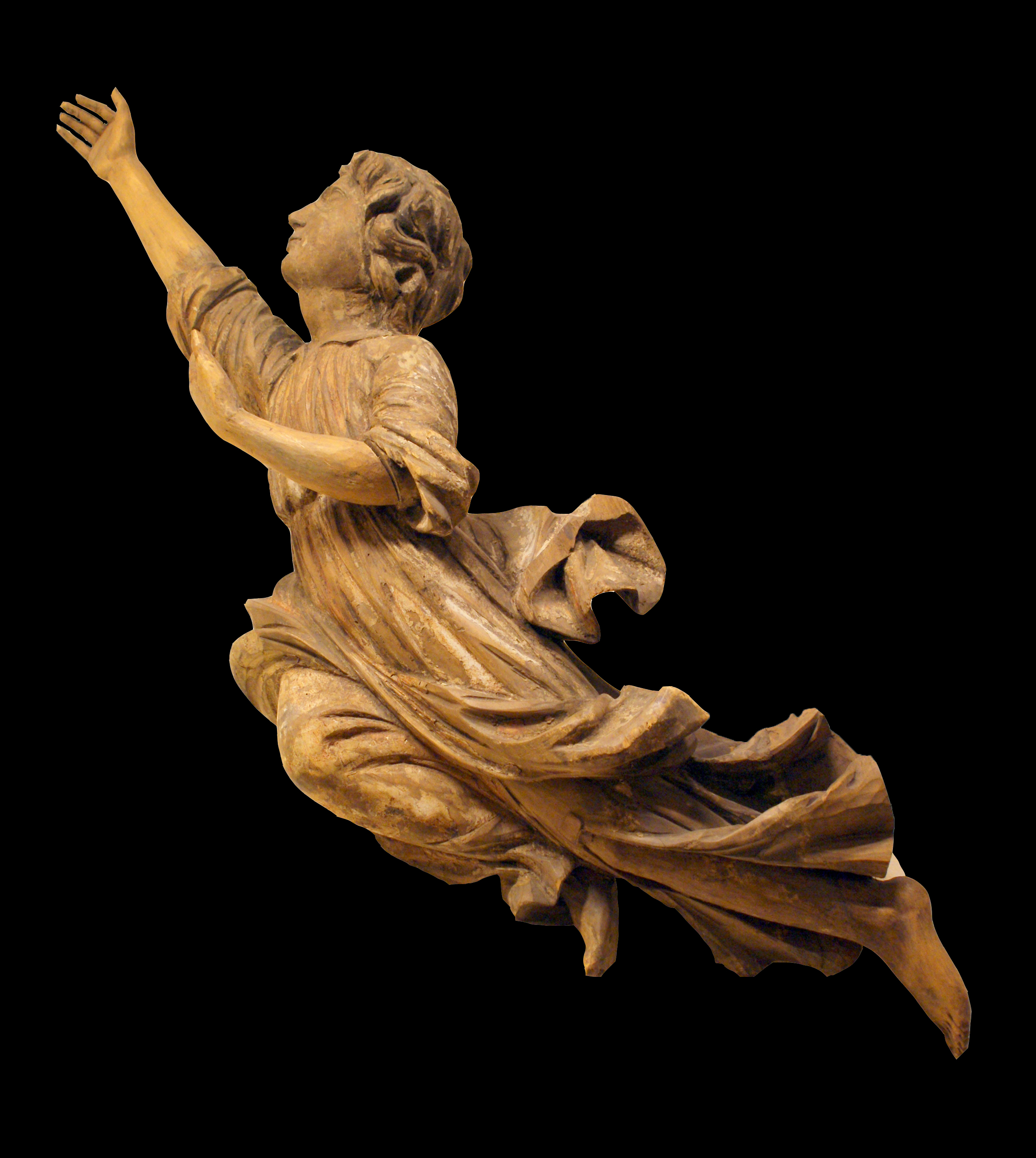 Анёлы. XVIII ст. Гарадзец Быхаўскага раёна Магілёўскай вобласці